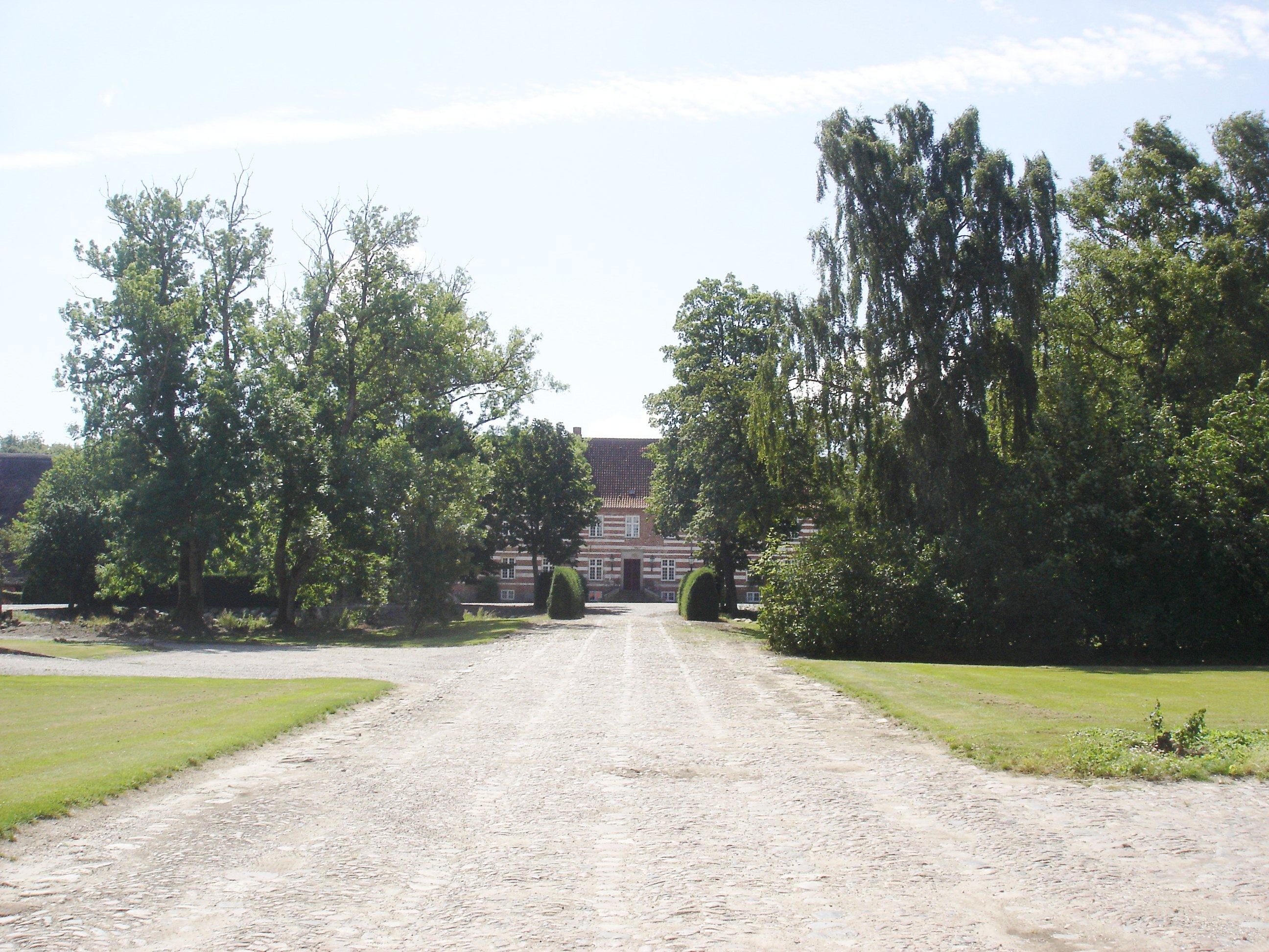 Godset Beldringes hovedbygning